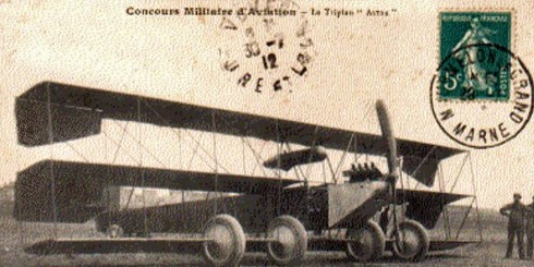 une carte postale de France d'avant 1930. Triplan Astra lors du concours militaire Champagne 1911.